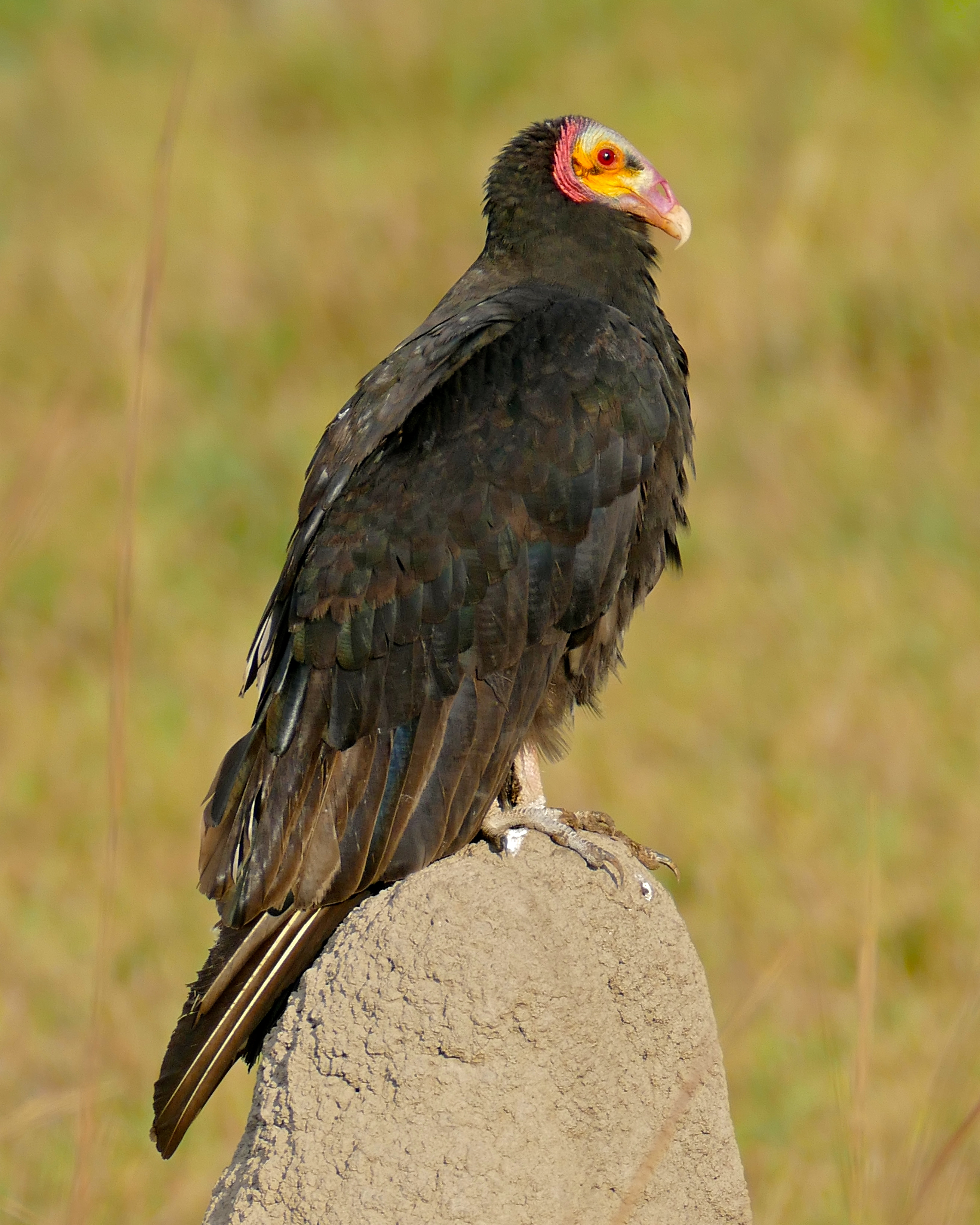 Transpantaneira, Poconé, Mato Grosso, BRAZIL